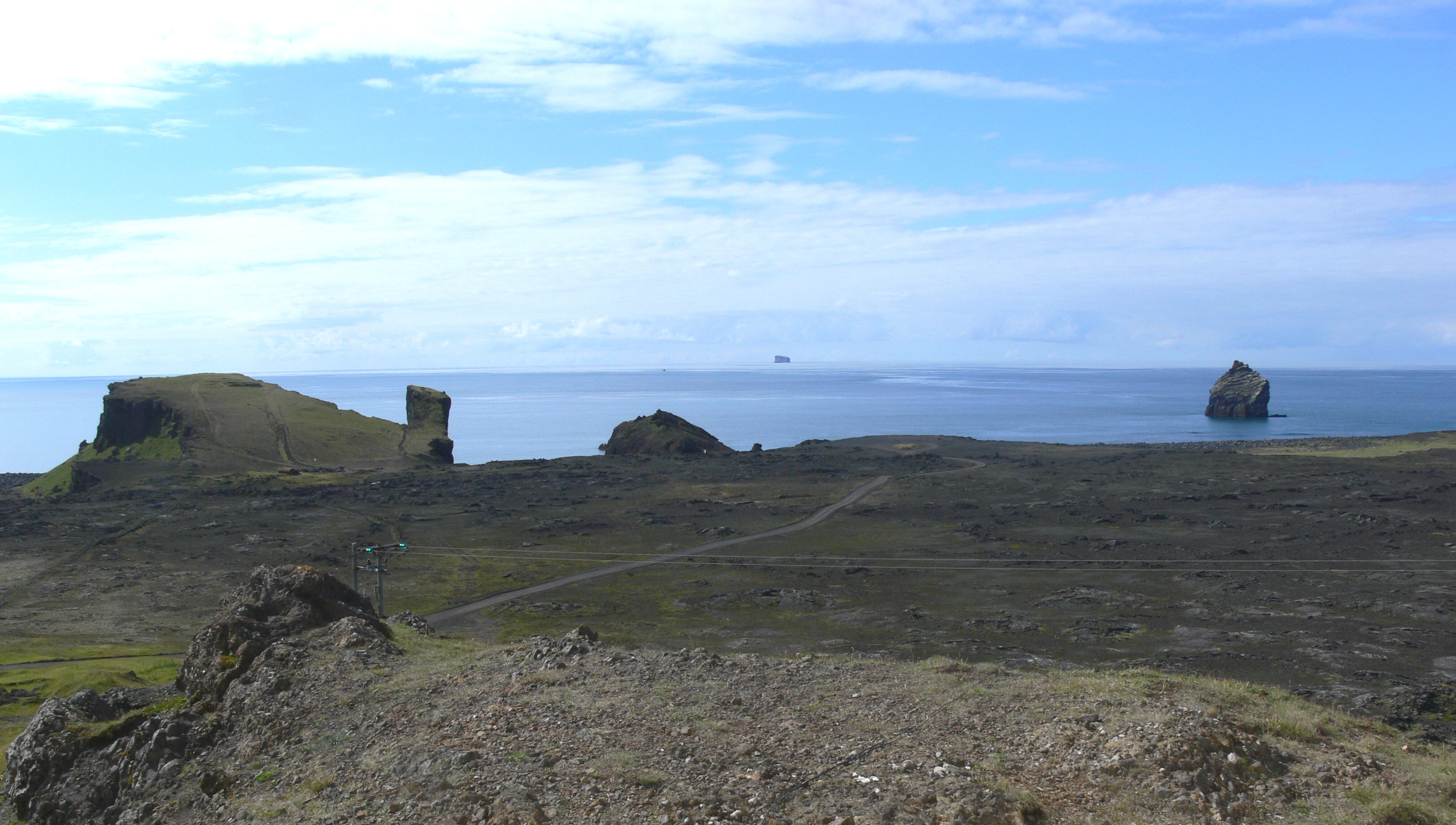 Reykjanestá, Südwestspitze von Reykjanes; am Horizont Eldey.